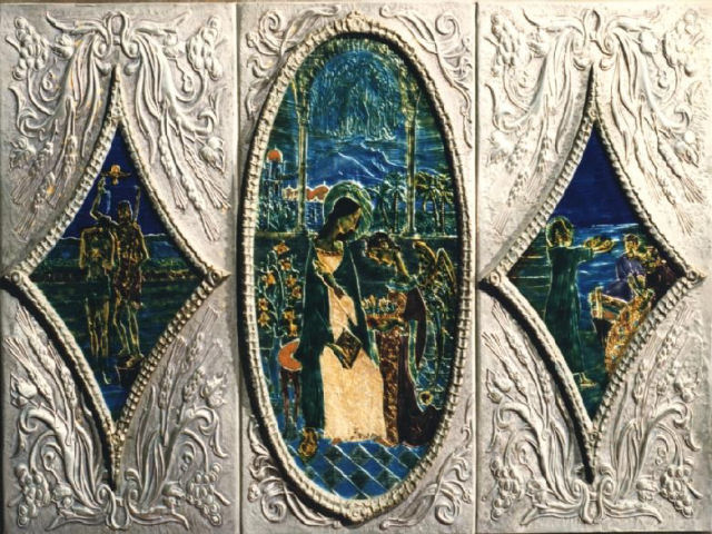 Particolare altare c/o San Domenico di Palermo (smalto su argento) - Opera propria